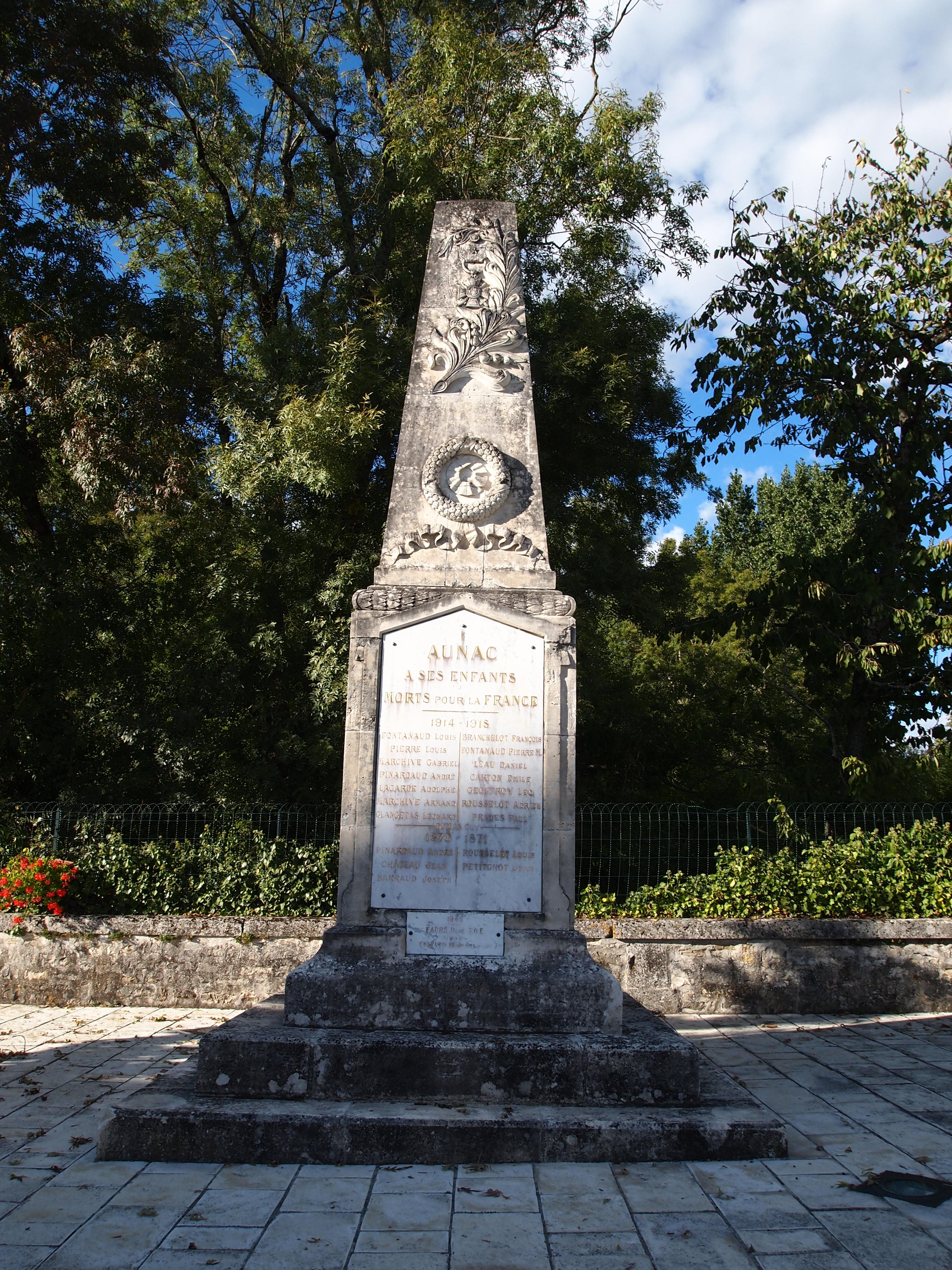 monument aux morts d'Aunac en Charente (France)